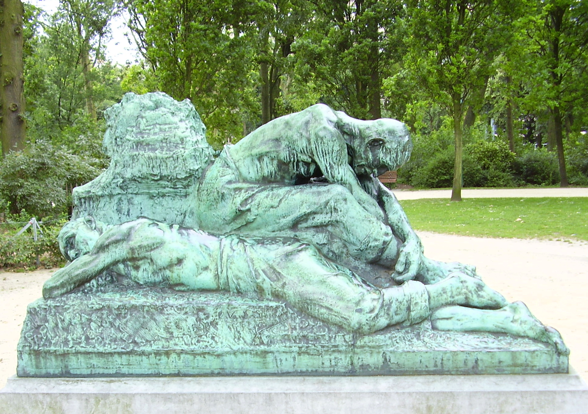 Description: Les Bâtisseurs de ville, Charles Van der Stappen - Parc du Cinquantenaire, Bruxelles Author: User:Ben2 Date of creation: 21 juin 2006 Source: Photo personnelle